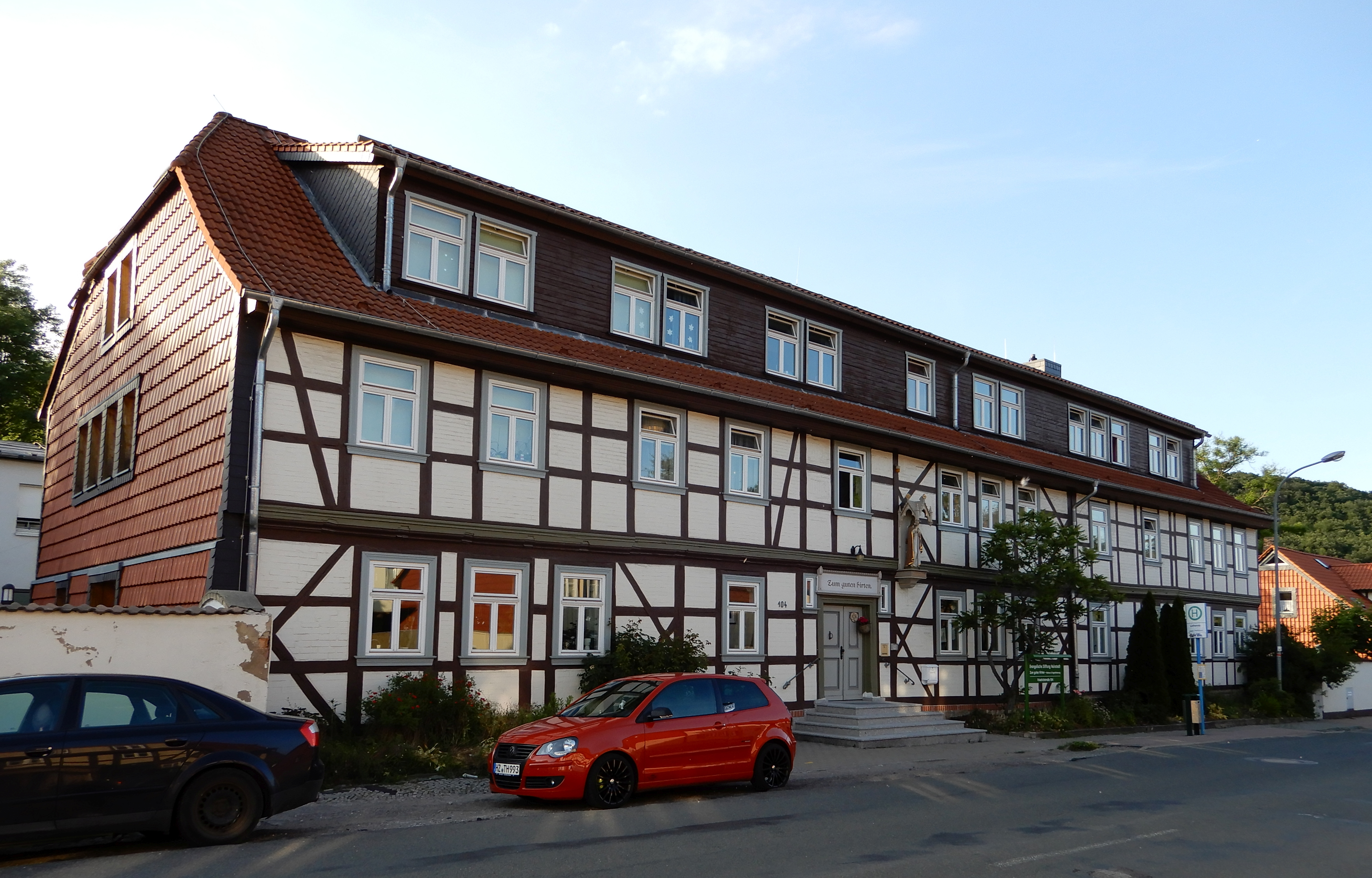 Hospital Zum guten Hirten in der Friedrichstraße, 1861 als Erziehungsheim für Mädchen eröffnet, zuvor Gasthaus.